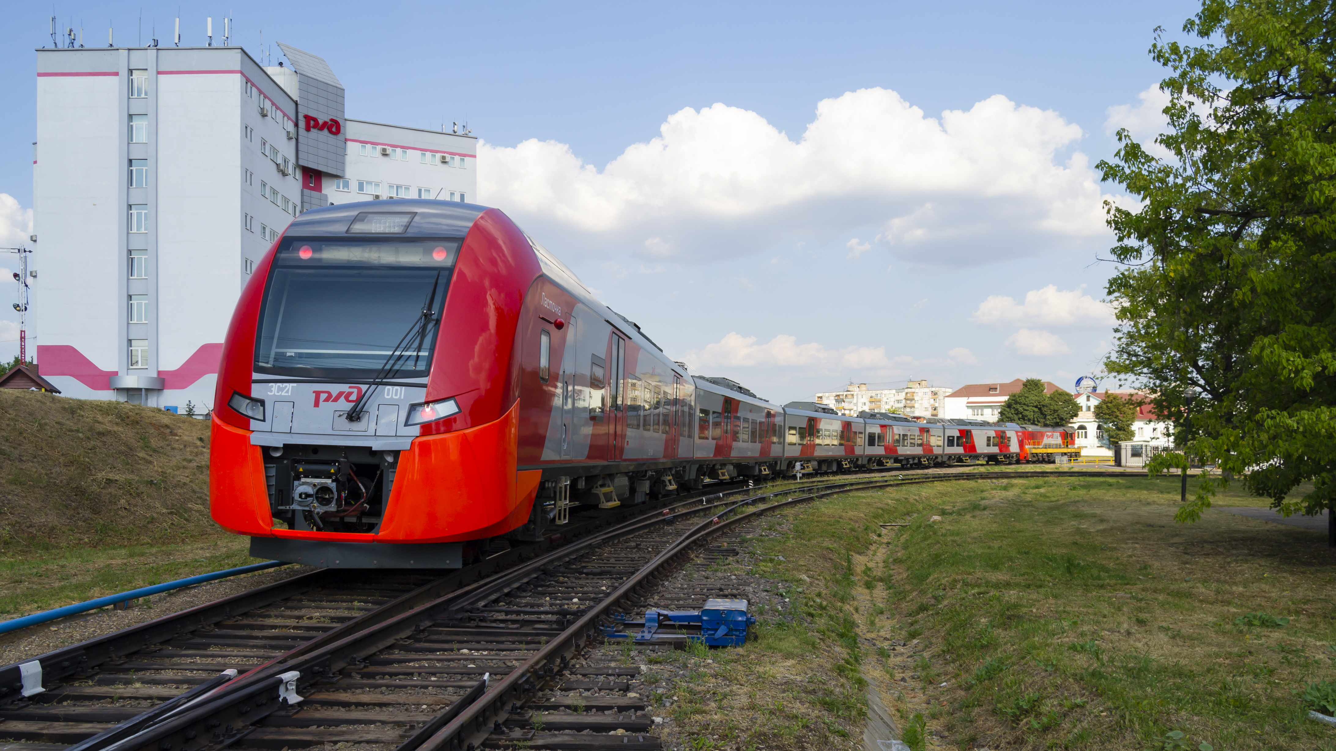 Электропоезд ЭС2Г-001 на подъездном пути кольца ВНИИЖТа в Щербинке.